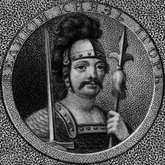 Вел. кн. Игорь.